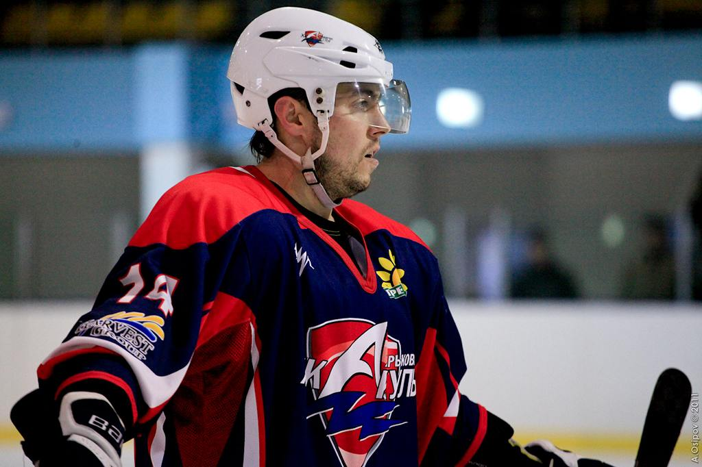 Шайбы: 3:38 Гончаров (Гнитько) - 0:1; Ю.Булгаков (Хмиль, Новиков) - 0:2; 33:28 Кручинин (Большаков) - 1:2; 58:12 Лупандин (Большаков, Посевин) - 2:2. Медведев - 3:2 (решающий буллит). Буллиты: 0:0 - Посевин (мимо). 0:0 - Хмиль (вратарь). 0:0 - Медведев (вратарь). 0:0 - Якимчук (вратарь). 0:0 - Вагин (вратарь). 0:0 - Гнитько (вратарь). 0:0 - Гнитько (вратарь). 0:0 - Большаков (мимо). 0:0 - Ю.Булгаков (вратарь). 1:0 - Медведев. Вратари: Анисимов - Горелов. Штраф: 50 - 26. Вбрасывания: 32 (10+9+10+3)) - 37 (10+10+16+1). Броски: 21 (7+4+10+0) - 22 (6+9+6+1).